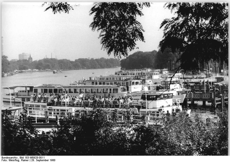 ADN-ZB Weisflog 28.9.80 Berlin: Bei diesem schönen Herbstwetter hatte auch die "Weiße Flotte" wieder volle Anlegestellen zu verzeichnen. In Berlin-Treptow stachen viele Hauptstädter und ihre Gäste "in See".